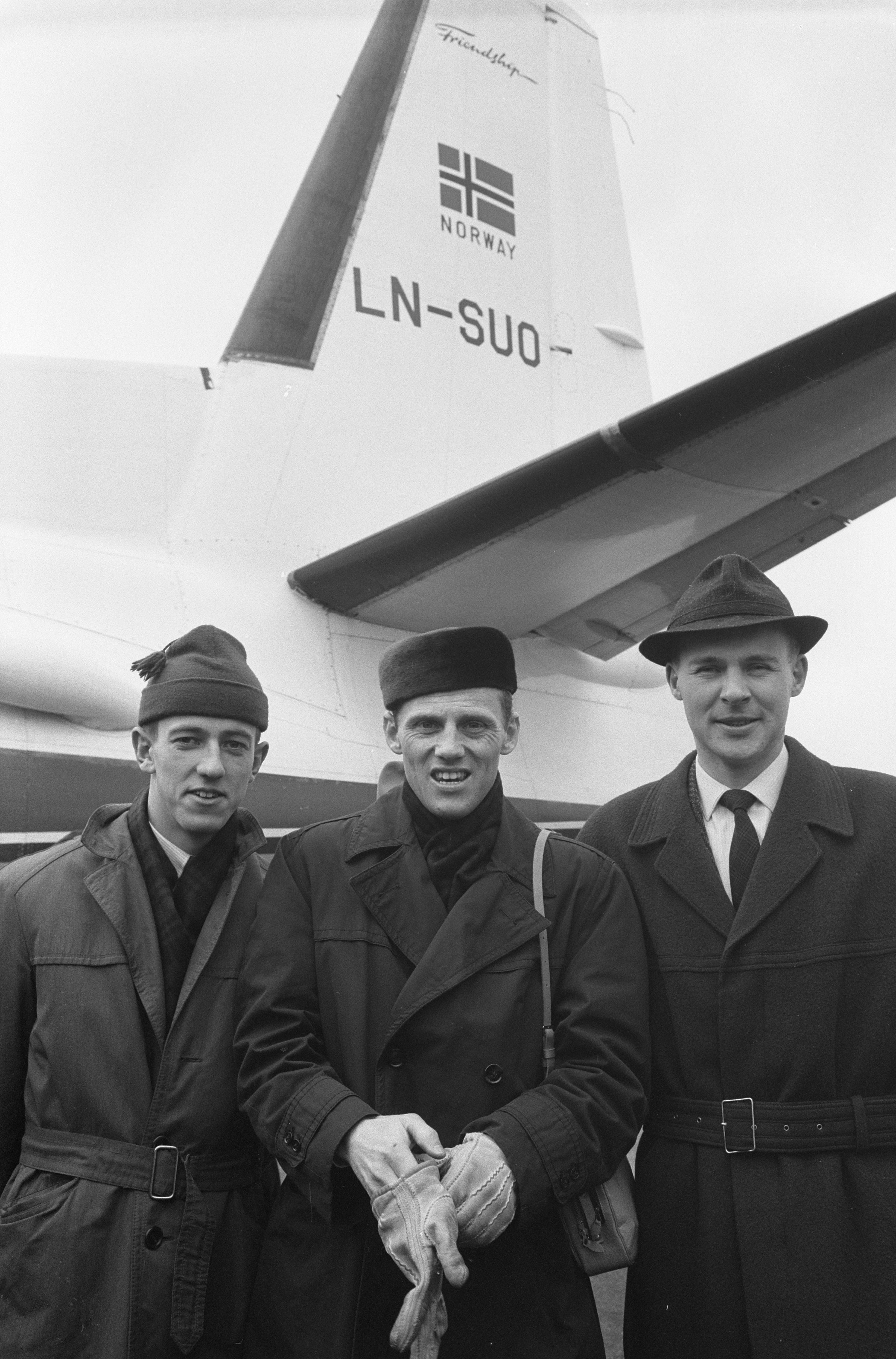 Collectie / Archief : Fotocollectie Anefo Reportage / Serie : [ onbekend ] Beschrijving : Aankomst Zweedse en Noorse schaatsploegen op Schiphol. Vlnr. Johnny Nilsson (Zweden), Ivar Nilsson (Zweden), Knut Johannesen (Noorwegen) Datum : 23 februari 1962 Locatie : Noord-Holland, Schiphol Trefwoorden : schaatsen, schaatsers, sport, vliegvelden Persoonsnaam : Johannesen, Knut, Nilsson, Ivar, Nilsson, Johnny Fotograaf : Pot, Harry / Anefo Auteursrechthebbende : Nationaal Archief Materiaalsoort : Negatief (zwart/wit) Nummer archiefinventaris : bekijk toegang 2.24.01.05 Bestanddeelnummer : 913-5565